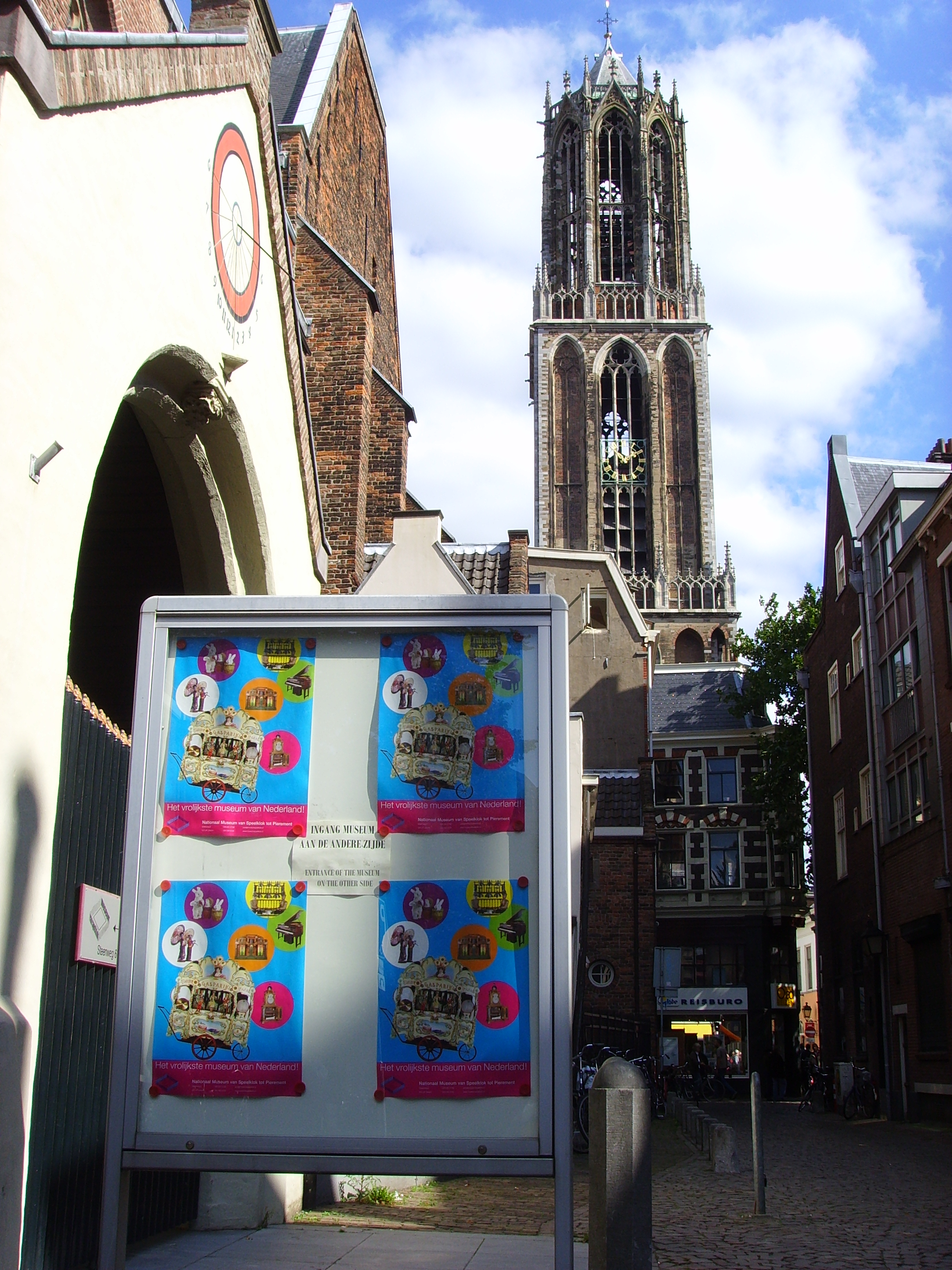 De Buurkerk en de Domtren in de Utrechtse binnenstad, met reclameposters voor het Museum van Speelklok tot Pierement dat daar gevestigd is. 24″ N, 5° 07′ 09.36″ E